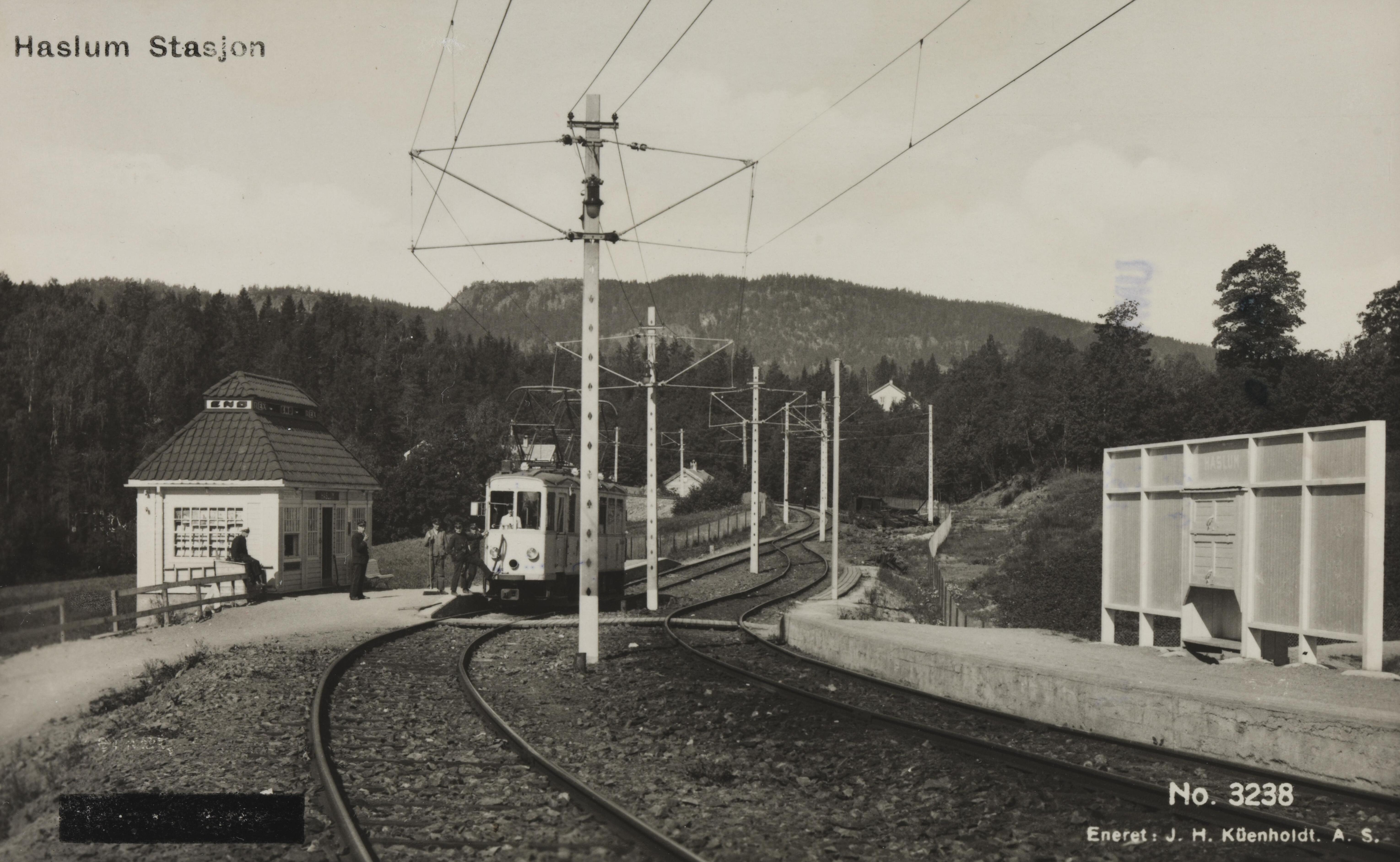 Bildet er hentet fra Nasjonalbibliotekets bildesamling Bærum,Haslum,Haslum stasjon, Bærum, Akershus